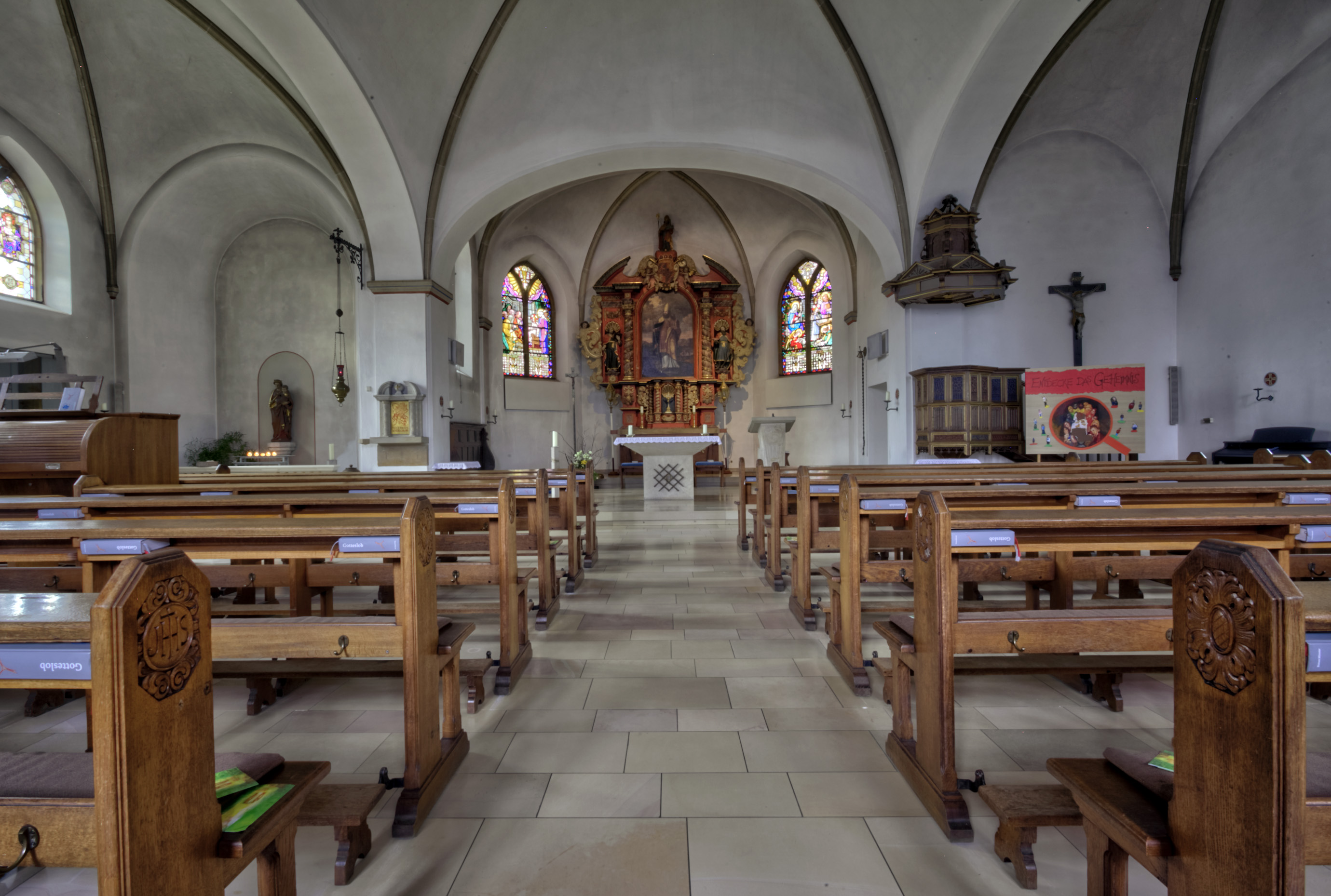 Elte, St. Ludgerus, Hauptschiff